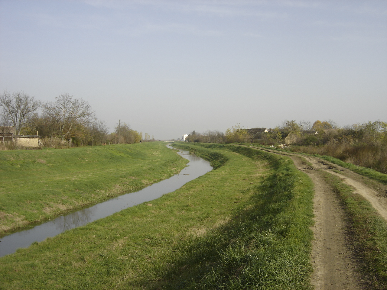 rječica Karašica (Baranja) na ulasku u Branjin Vrh